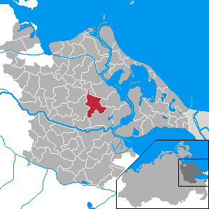 Rubkow, Landkreis Ostvorpommern, Mecklenburg-Vorpommern